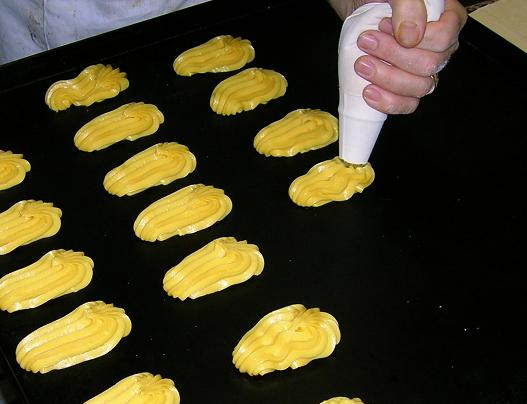 bignè